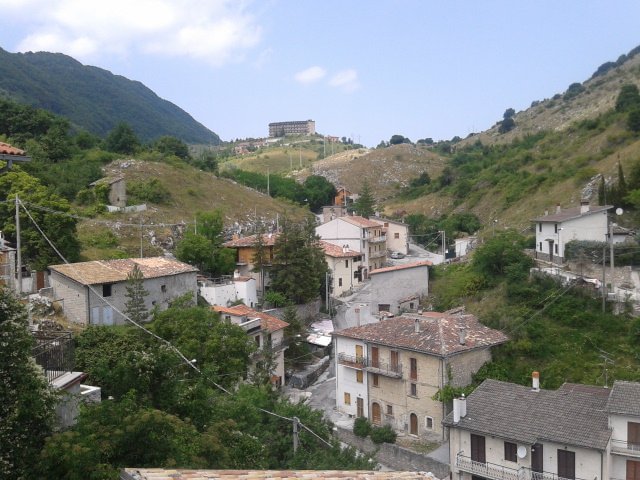 Il monte Bove visto da Roccacerro